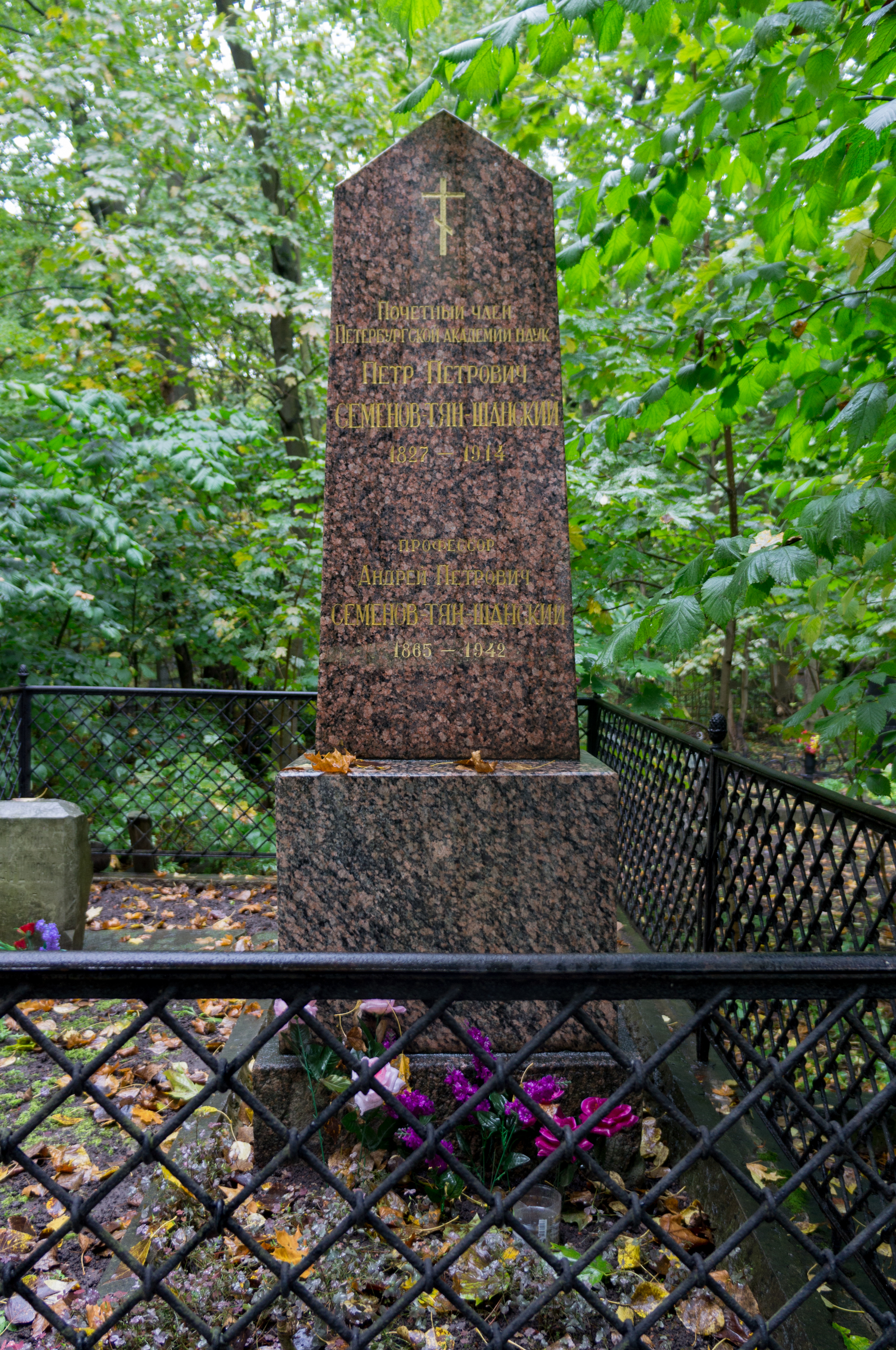 Могила Семенова-Тян-Шанского П.П. (1827-1914), географа и путешественника: улица Камская, 24, Смоленское православное кладбище, угол Вознесенской и Кочетовской дорожек, Васильевский, Василеостровский район, Санкт-Петербург